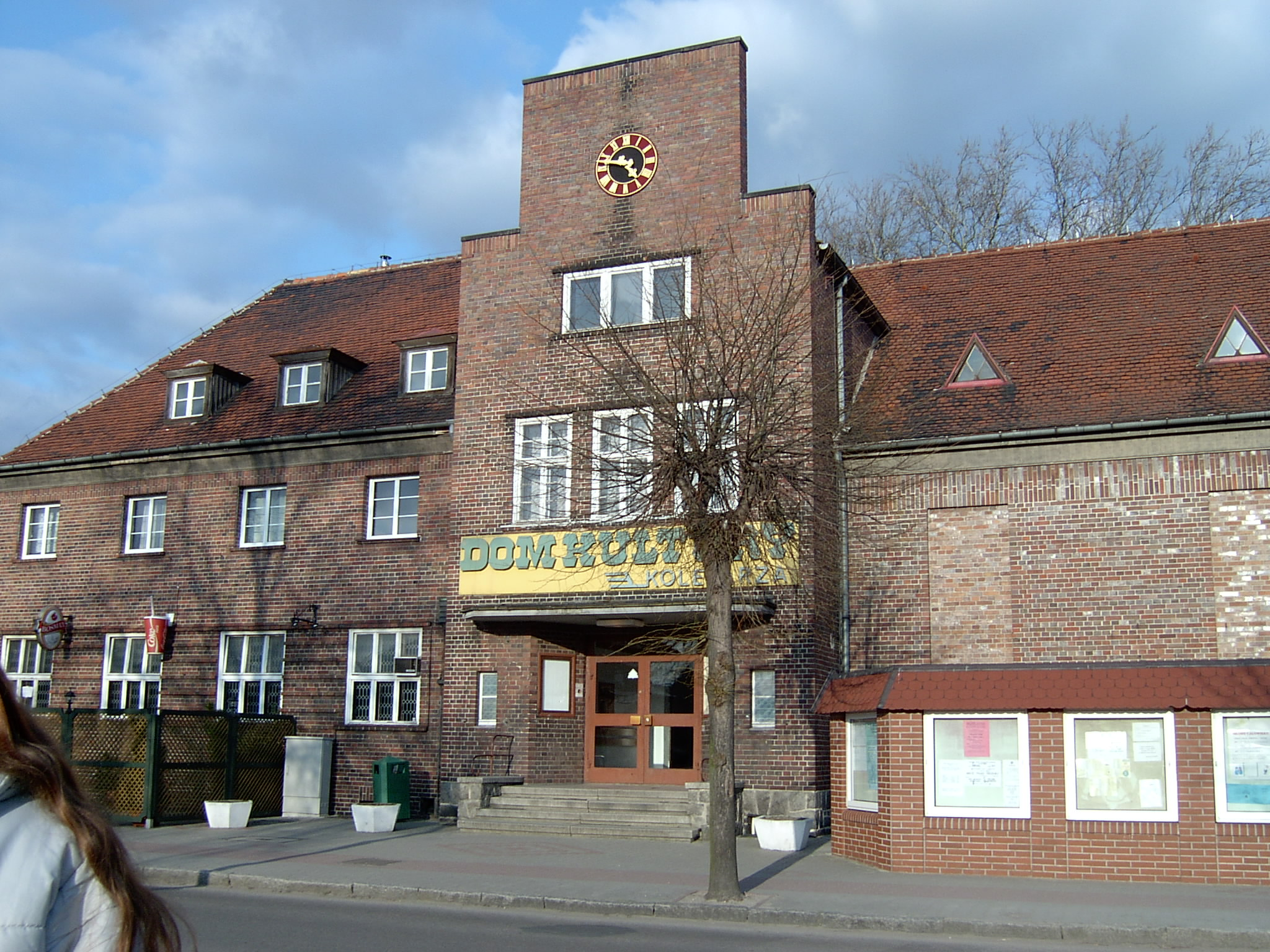 Dom Kultury "Kolejarz", Zbąszynek.